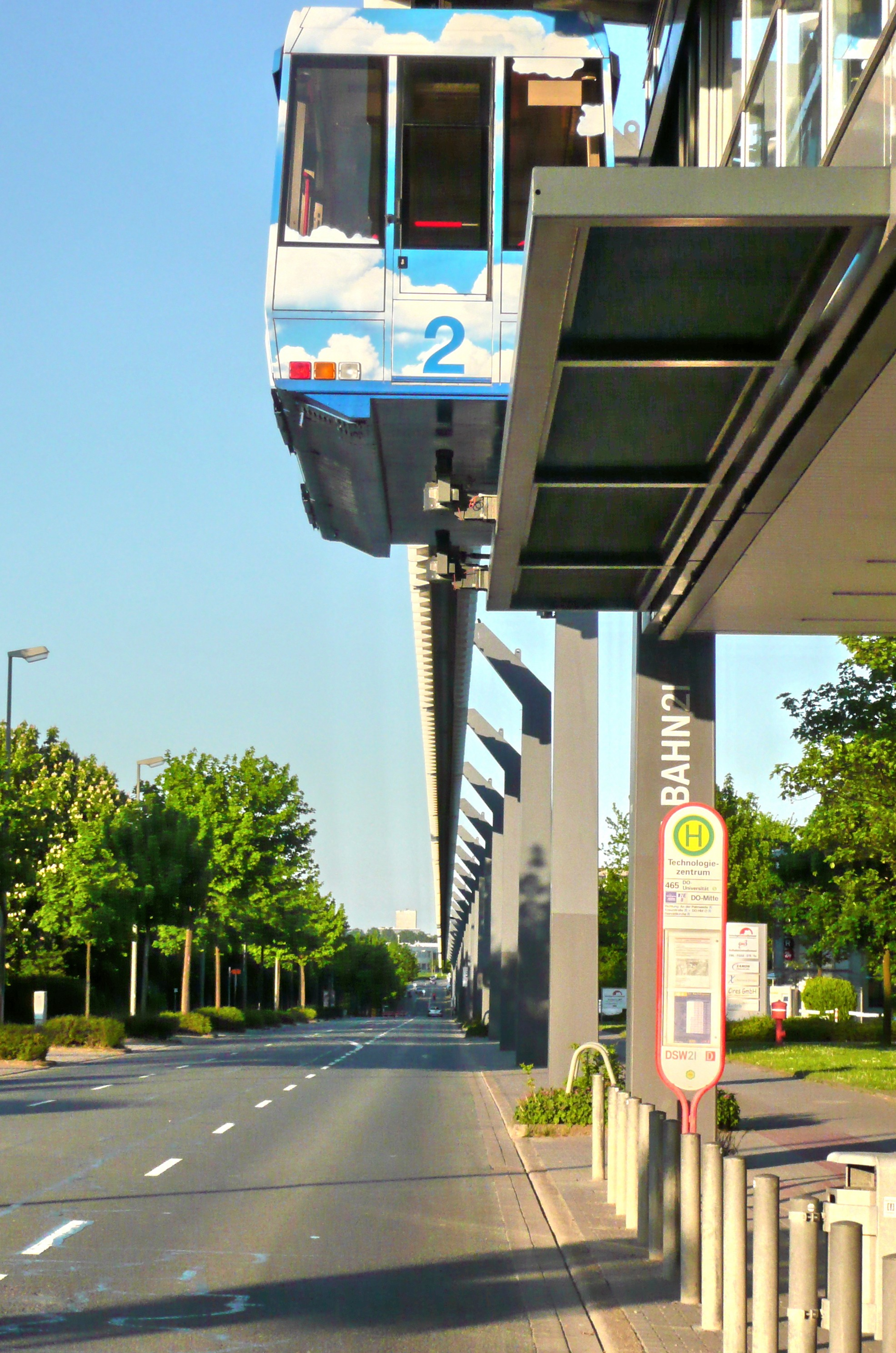 H-Bahn Trasse am Technologiezentrum Dortmund